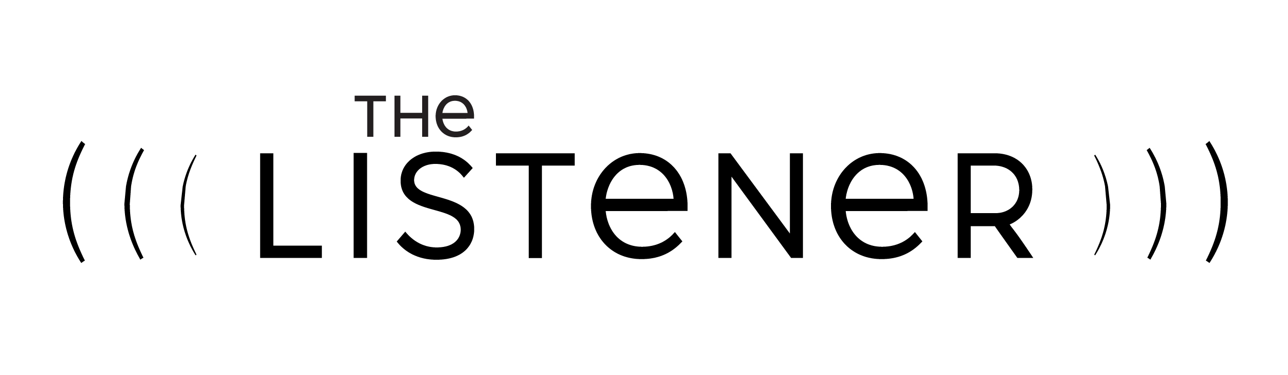 Diese Grafik zeigt das Logo der TV Serie The Listener